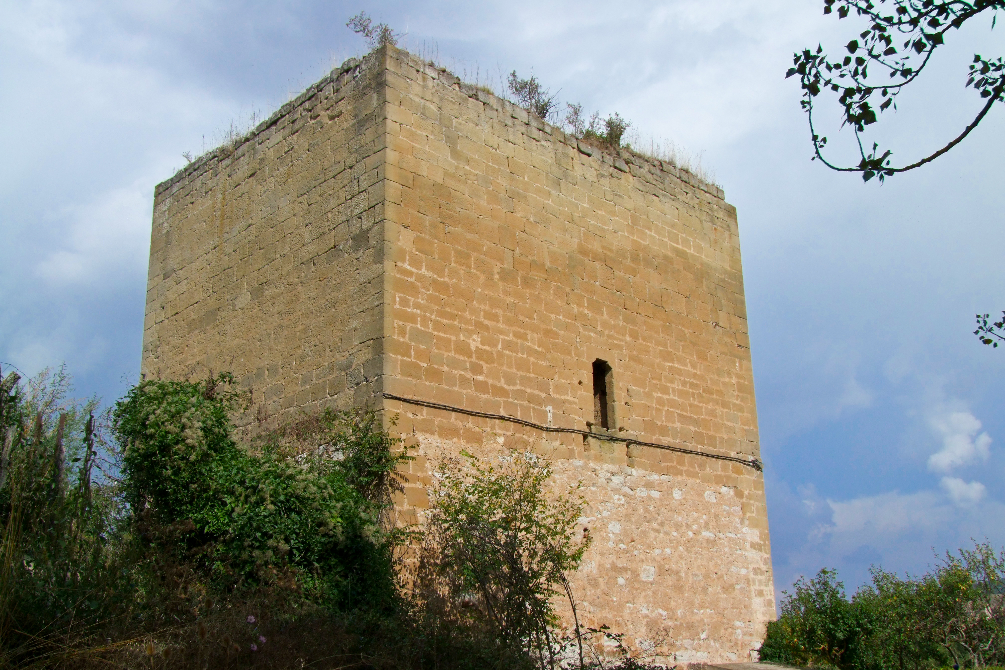 Torre Fuerte en la localidad de Santurde de Rioja, La Rioja - España